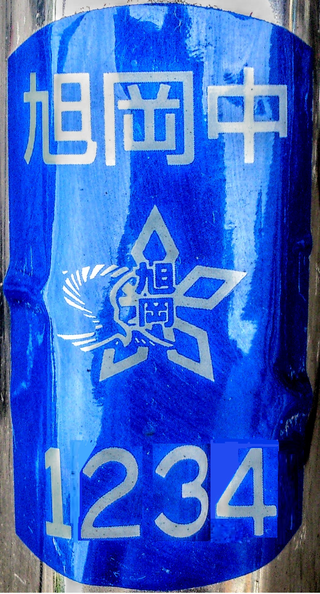 長岡旭岡中学校の自転車ステッカー